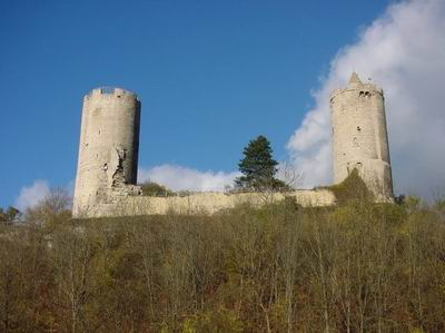 Burg Saaleck public domain, eigenes Foto von 2003 Mewes